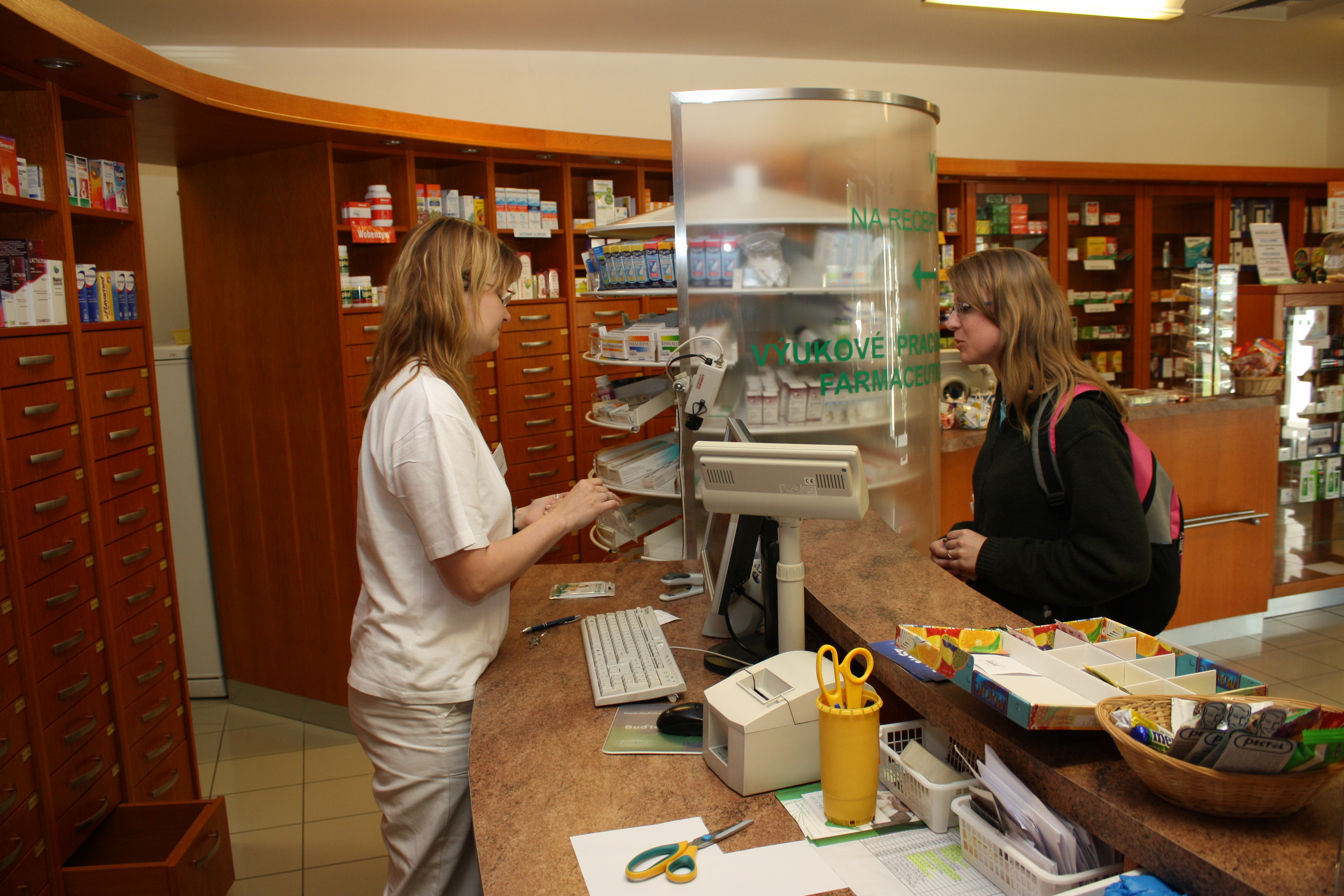 Součástí studia jsou i praktická cvičení